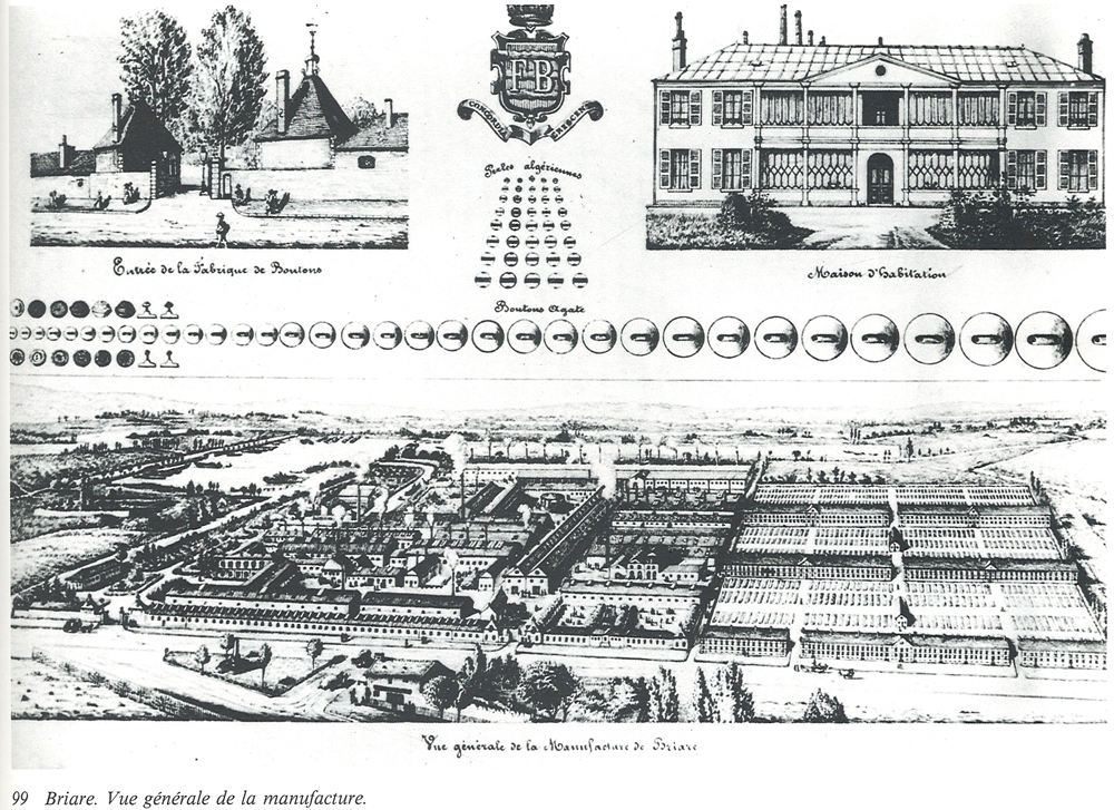 Gravure de Laurent Victor Rose. Vue générale de la manufacture des émaux de Briare. Entrée de la fabrique de boutons. Maison d'habitation de Jean-Félix Bapterosses.